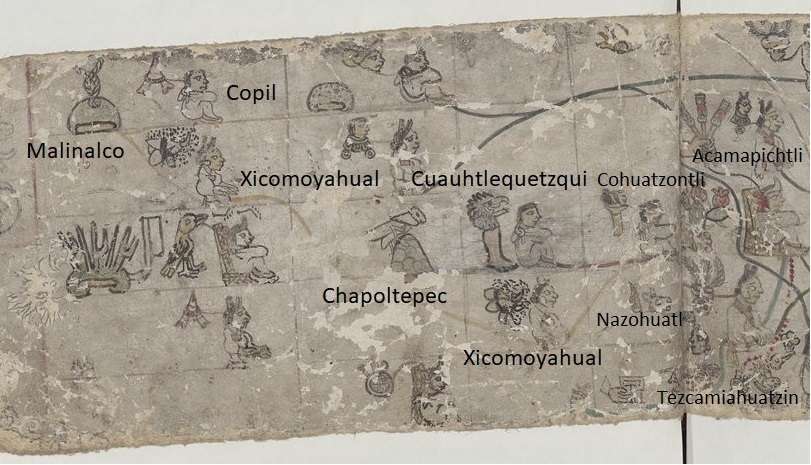 Lámina 16 del Códice mexicanus que se encuentra en la Biblioteca Nacional de Francia. Contiene parte del origen de los gobernantes mexicas.